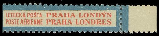 Авиапочтовый ярлык Чехословакии. Маршрут Прага - Лондон